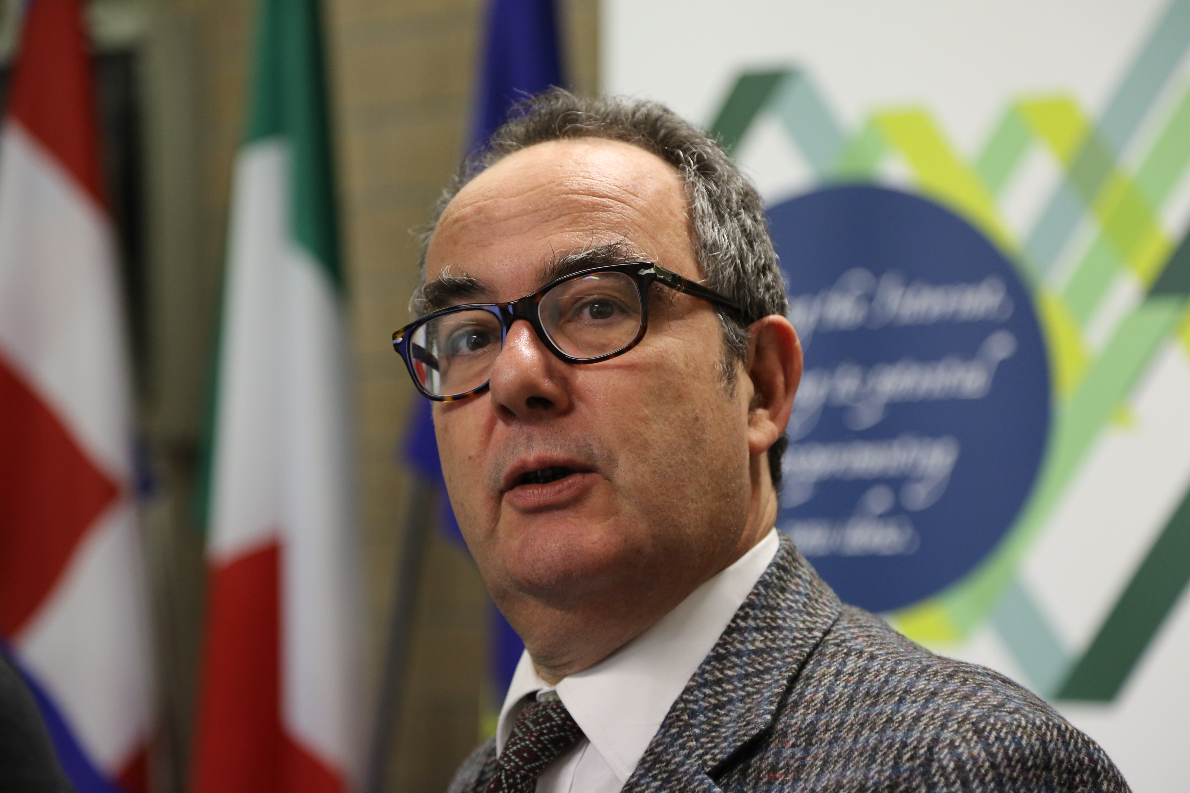 Foto di Marco Ricolfi scattata l'8 gennaio 2014 in occasione di un incontro pubblico organizzato dal Centro Nexa su Internet e Società